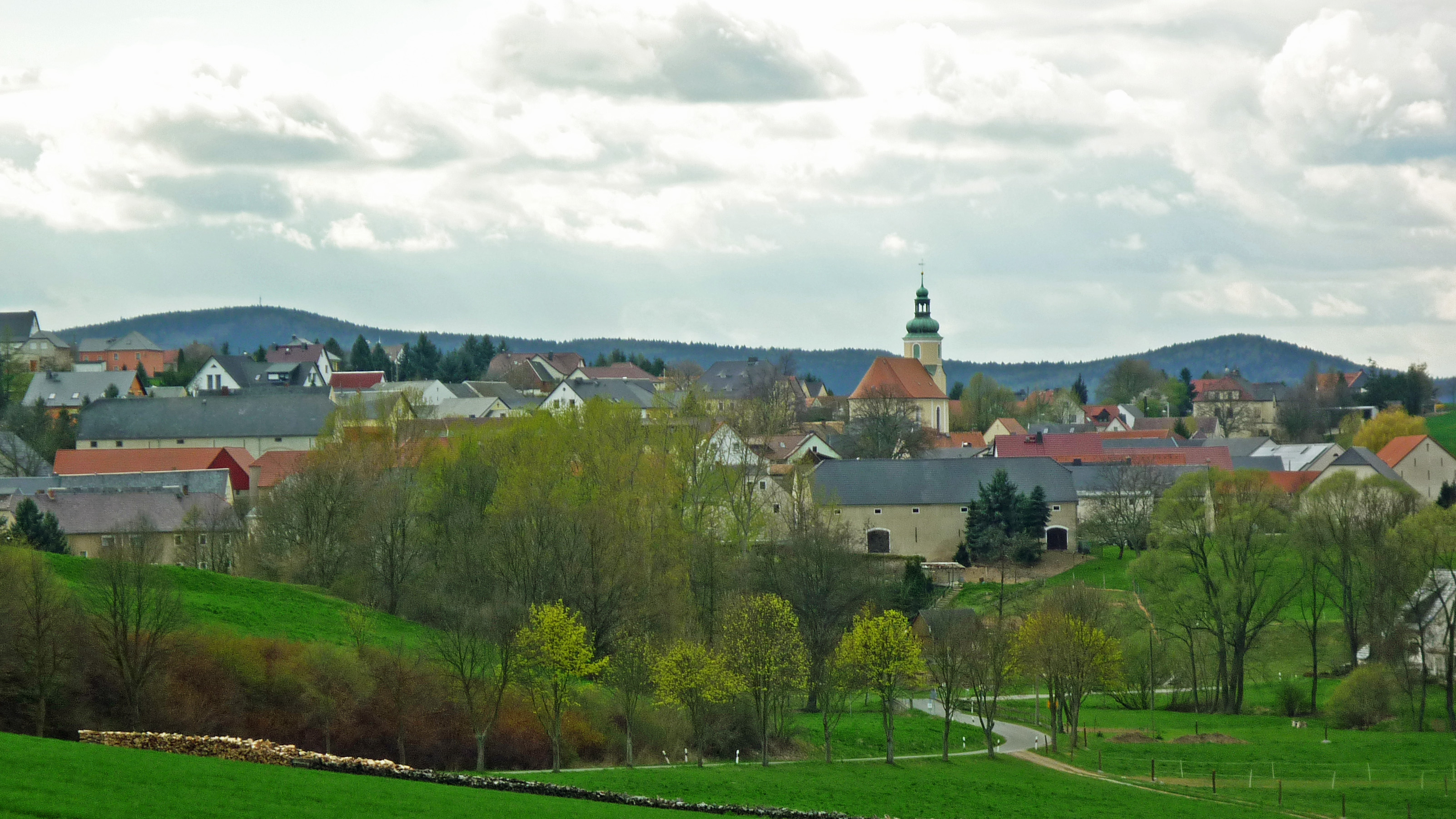 Blick auf Ostro/Wotrow in der Oberlausitz